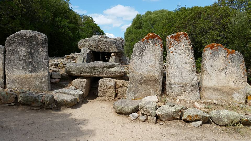 Tomba dei Giganti "Su Monte de s'Ape" This is a photo of a monument which is part of cultural heritage of Italy.